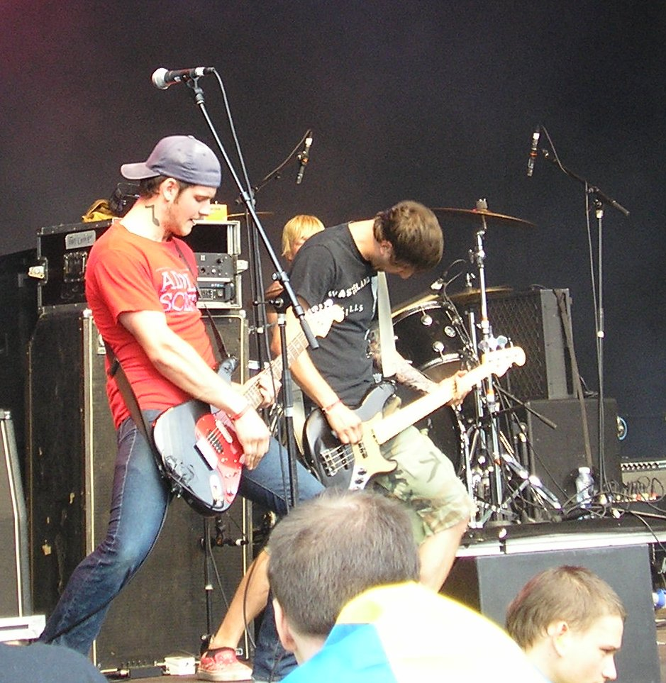 No Trigger playing at Augustibuller 2007.